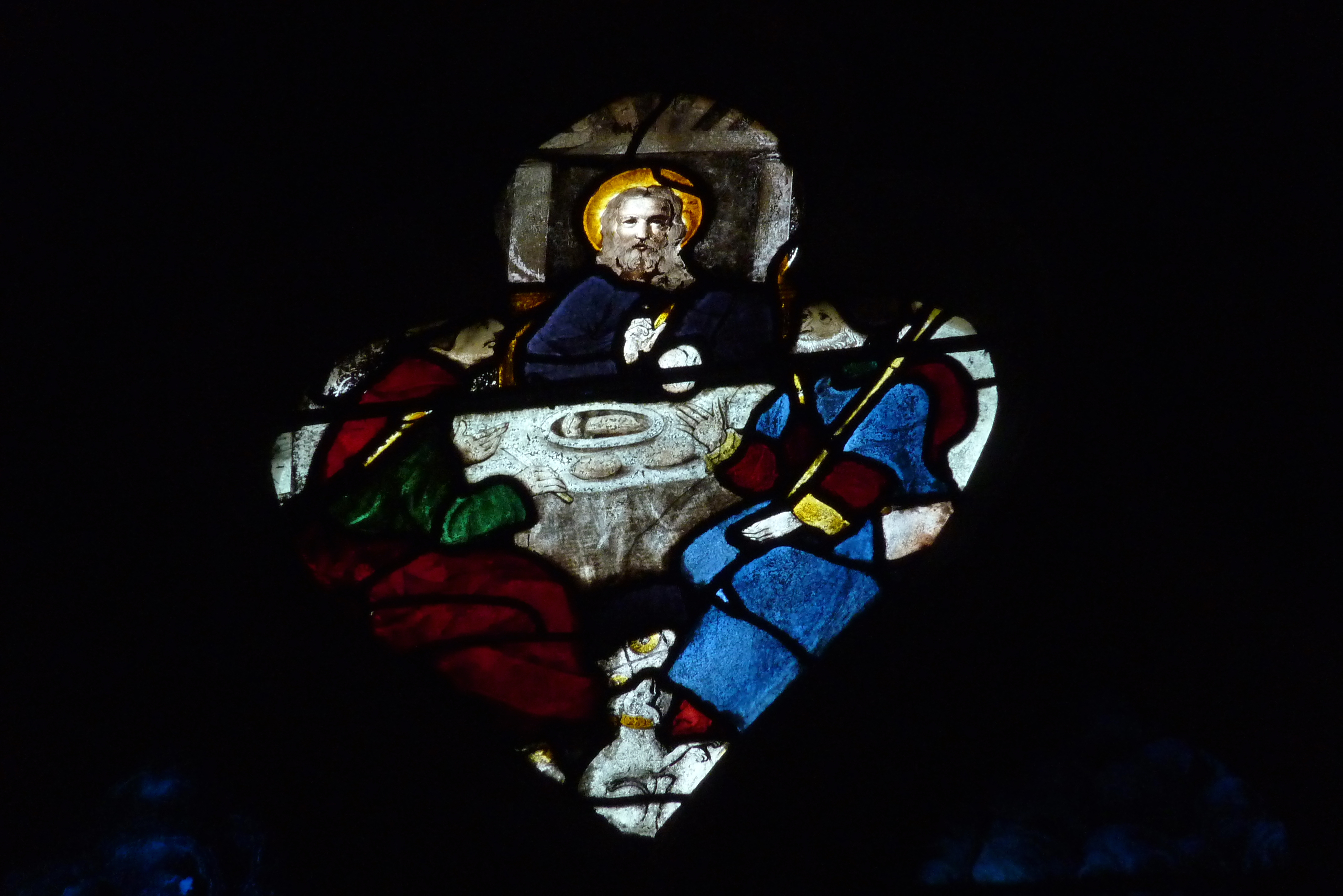 Katholische Pfarrkirche Saint-Martin in Herblay, einer Gemeinde im Département Val d'Oise (Île de France), Bleiglasfenster aus dem 16. Jh., Darstellung: Emmausjünger